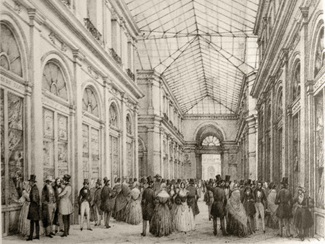 Stampa ottocentesca dell'originale Galleria De Cristoforis a Milano